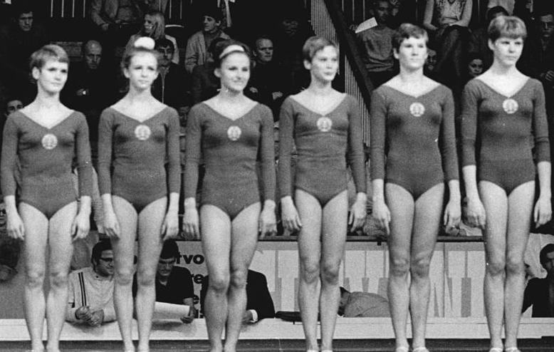 ADN-ZB-Schaar-26.10.1970-ma-Ljubljana (Jugoslawien): XVII. Weltmeisterschaften im Turnen, Kür der Frauen am 25.10.70. Mit dem Gewinn der Silbermedaille in der Mannschaftswertung erreichte die DDR-Riege, die bisher beste Plazierung bei Weltmeisterschaften und Olympischen Spielen. V.l.n.r.: Karin Janz, Richarda Schmeißer, Erika Zuchold, Angelika Hellmann, Marianne Noack und Christine Schmitt.